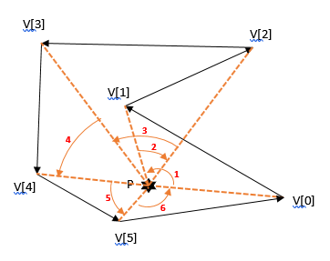 Algoritmo Radial. Orden y signo de los ángulo a sumar.